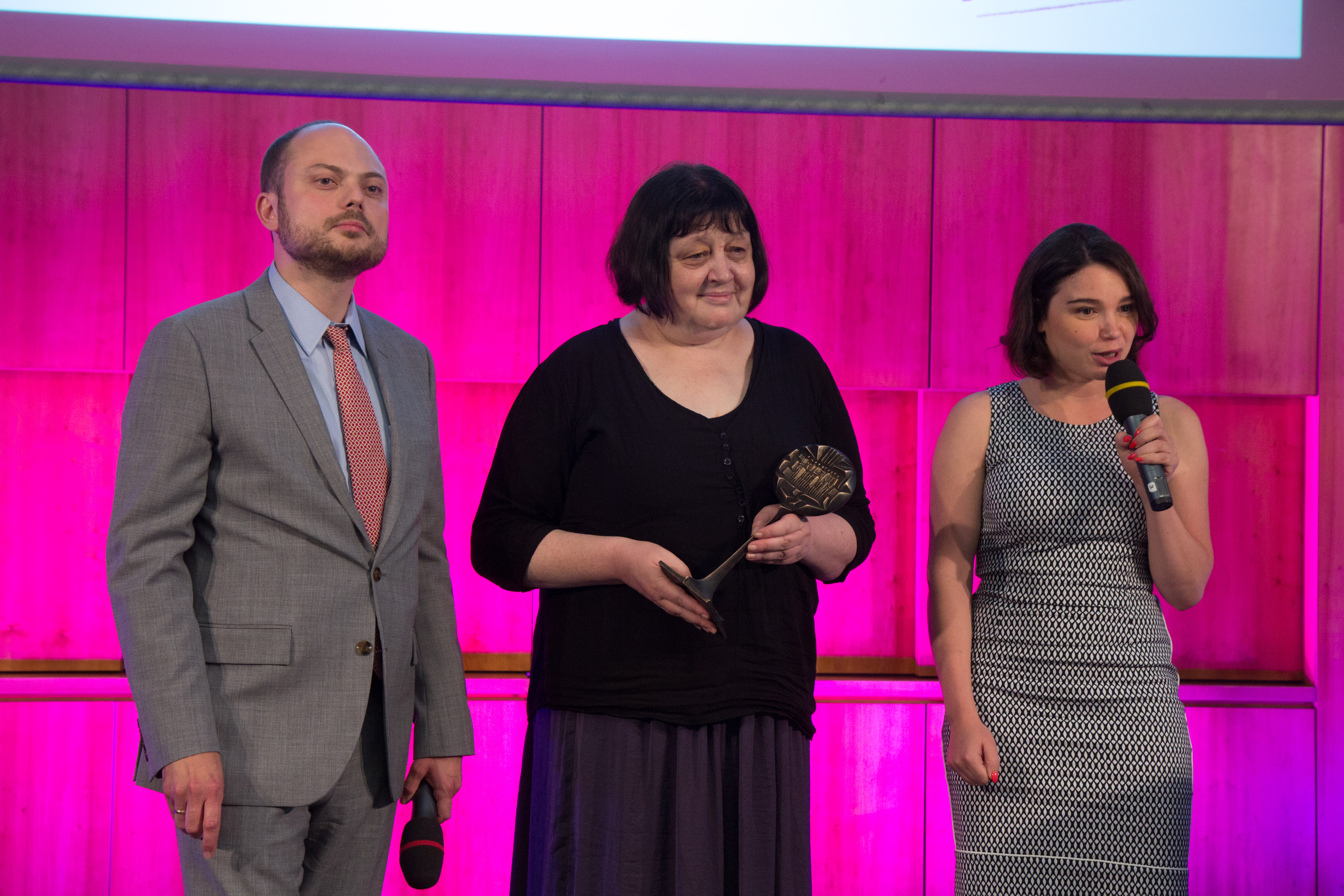 Verleihung des Boris Nemzow Preises am 20. Juni 2018 in Bonn an Nadezhda Mityushkina